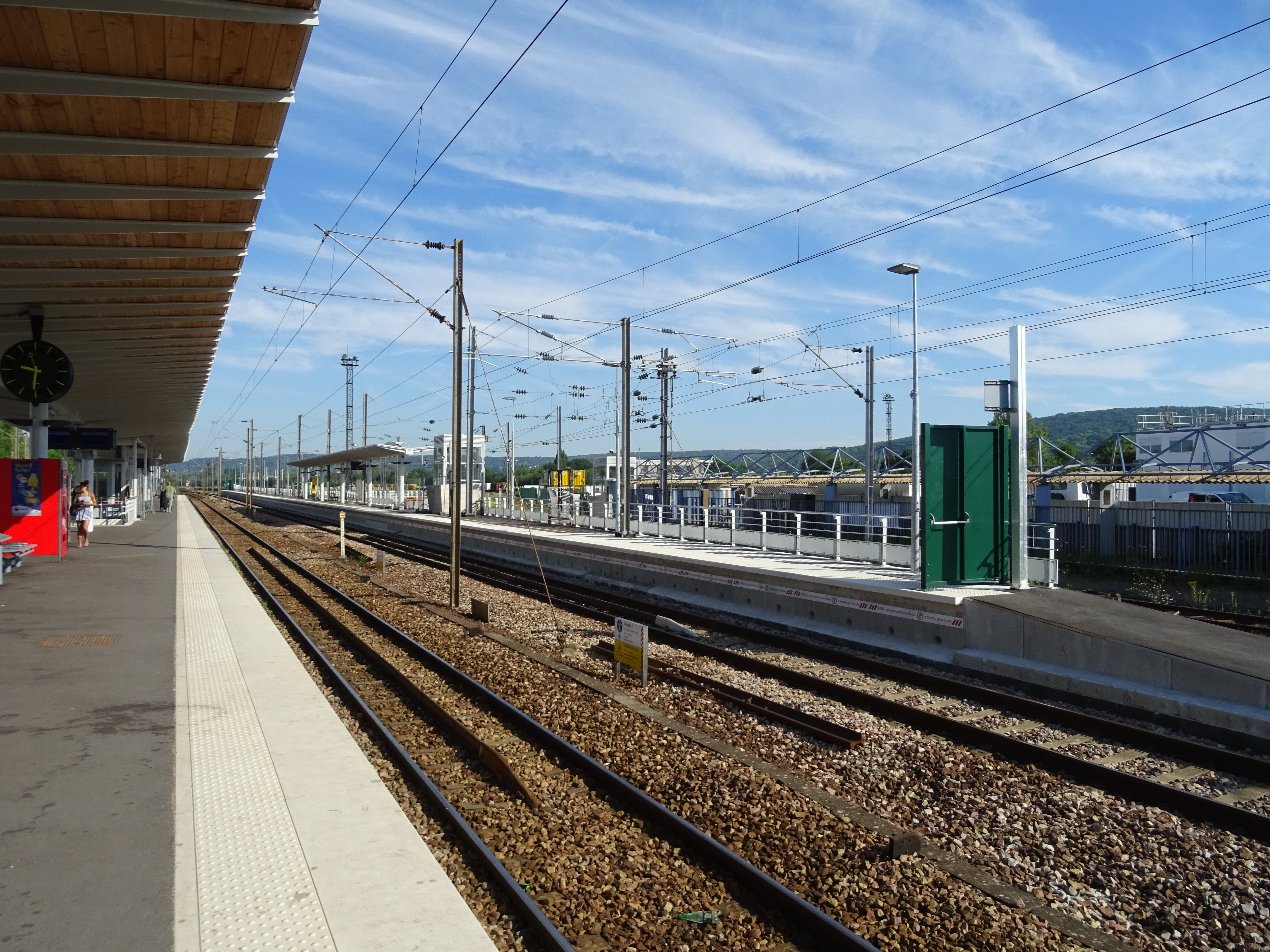 Voies centrales gare de Vernouillet-Verneuil